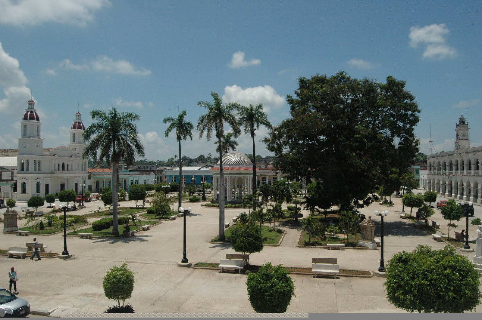 Vista panorámica del Parque Central de la Ciudad de Manzanillo